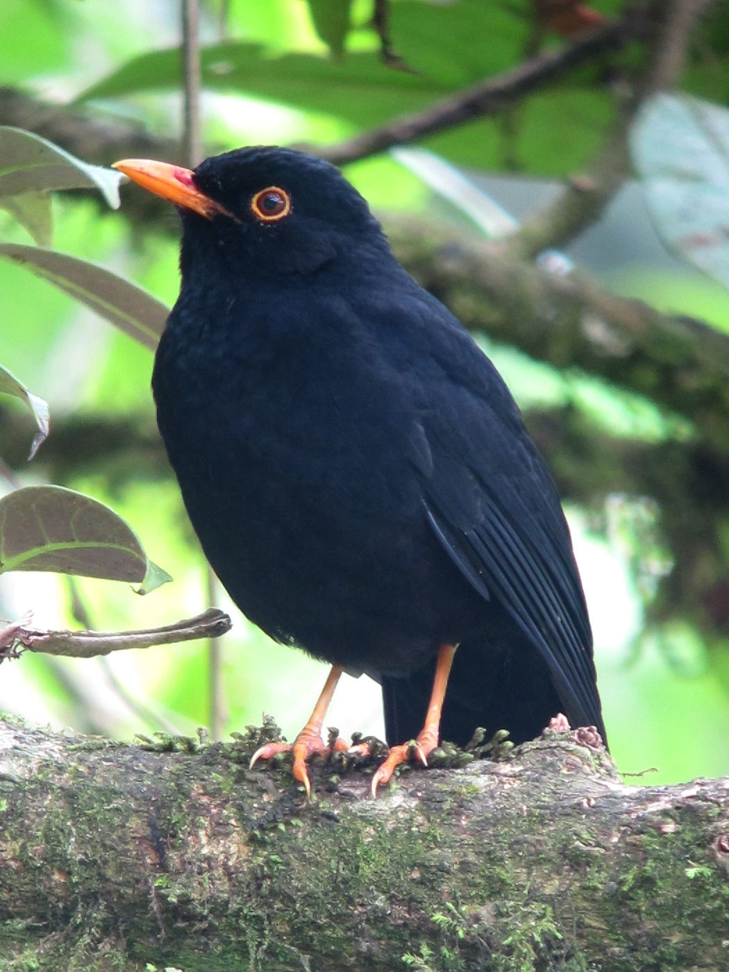 Cali, Valle, Colombia (Km. 18 , Finca Alejandría)